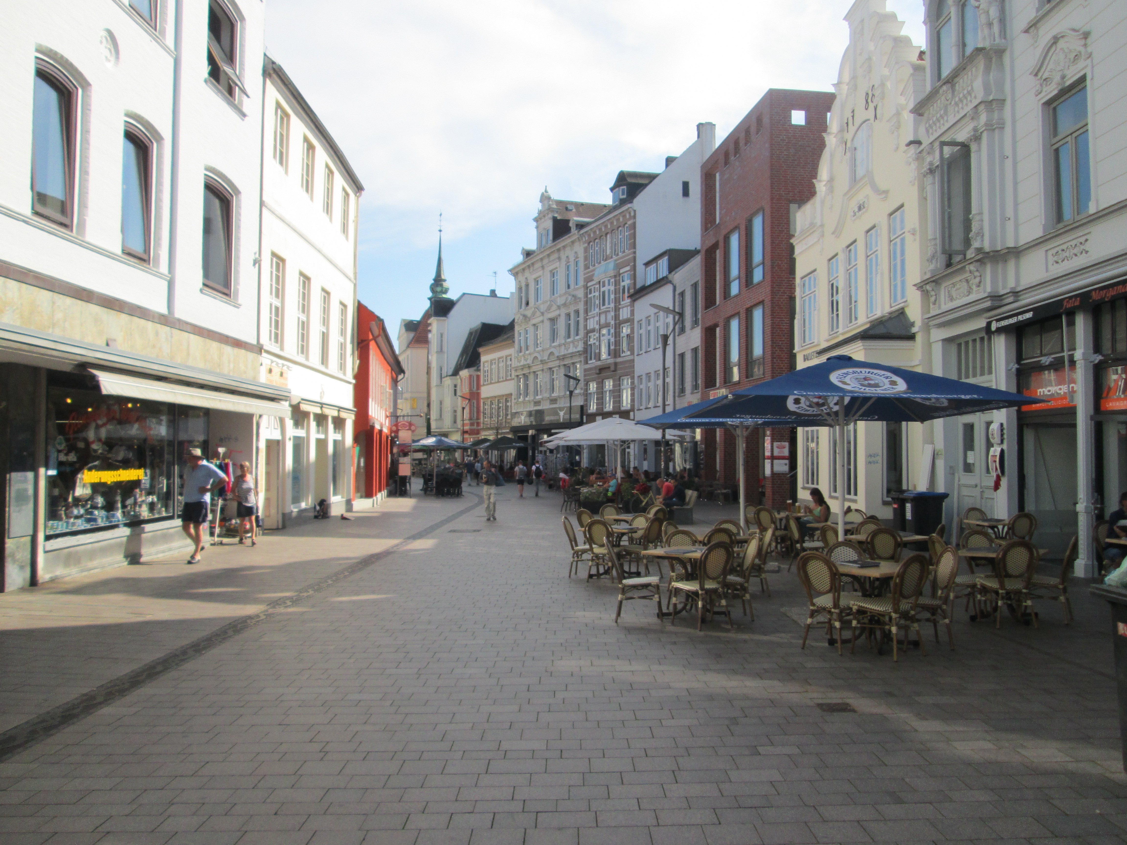 Storegade / Große Straße i Flensborg.